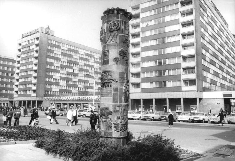 Leipzig, Sachsenplatz, Säule ADN-ZB Gahlbeck 30-6-1981 Schr.-Leipzig: Anziehungspunt für die Leipziger und ihre Gäste ist im Stadtzentrum immer wieder das Sachsenplatz. Im Vordergrund eine Keramiksäule mit der Darstellung von Szenen aus der Geschichte der Messestadt.